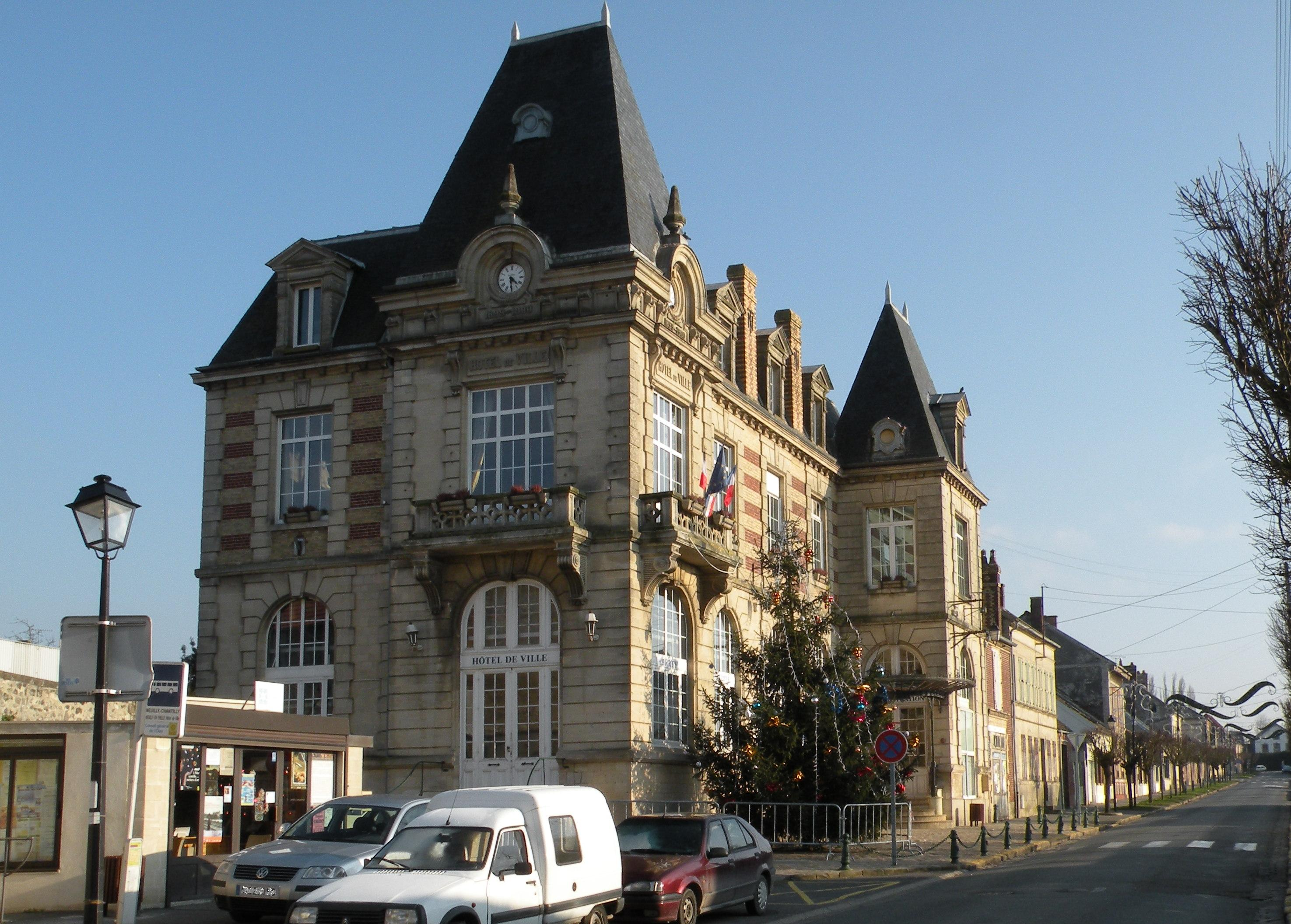 mairie de la commune de Neuilly-en-Thelle